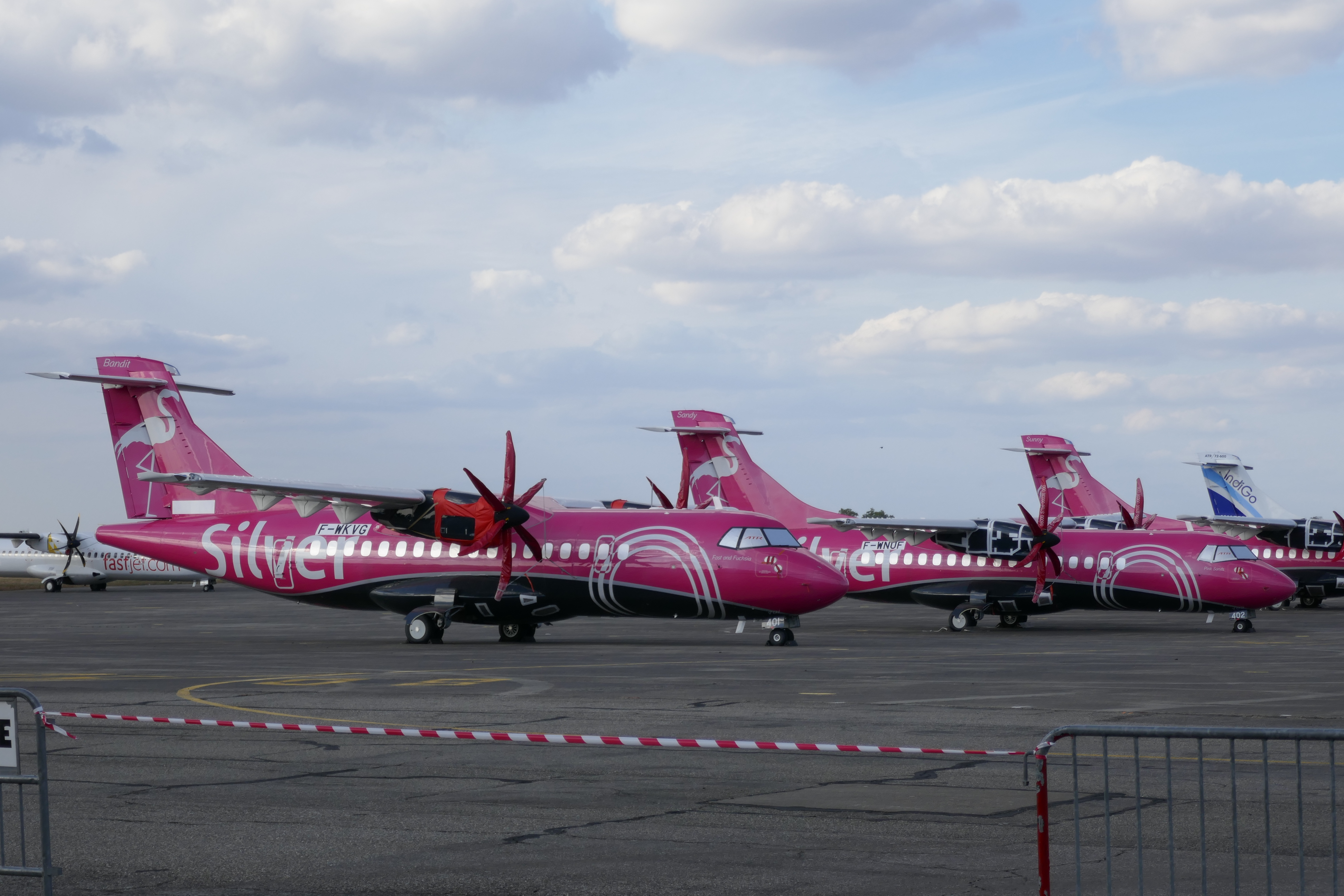 Enfilade de trois ATR 72-600 de la compagnie Silver Airways. Aérodrome de Toulouse Francazal (LFBF) le 30 septembre 2018.